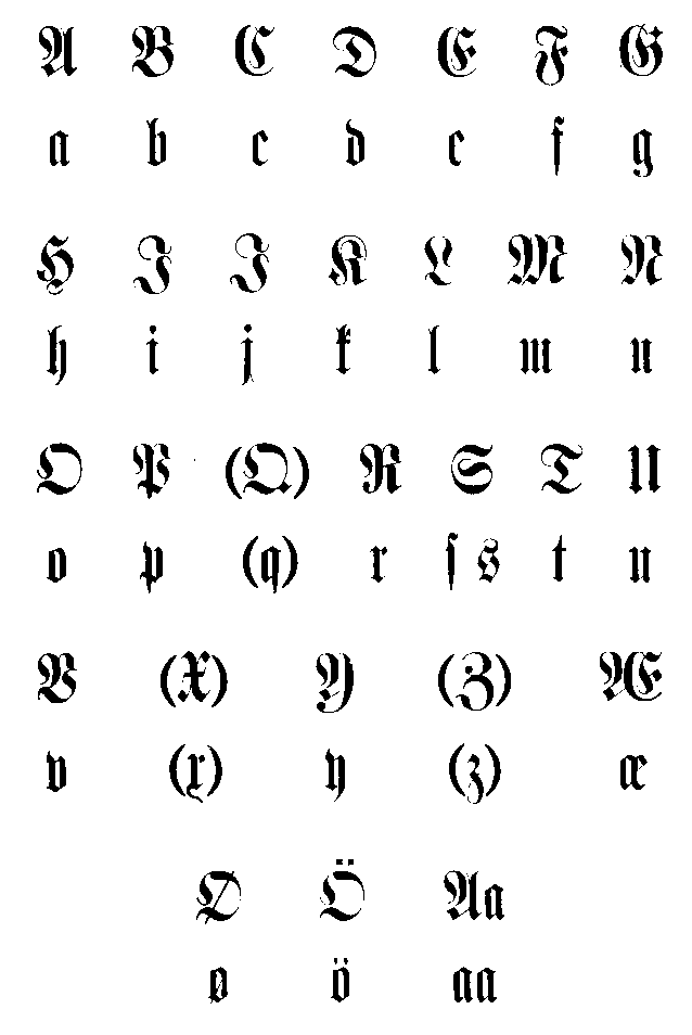 Udsnit fra: Hanebogen. Læsebog med Billeder 1. Del udgivet af Julie Heins. København 1890.